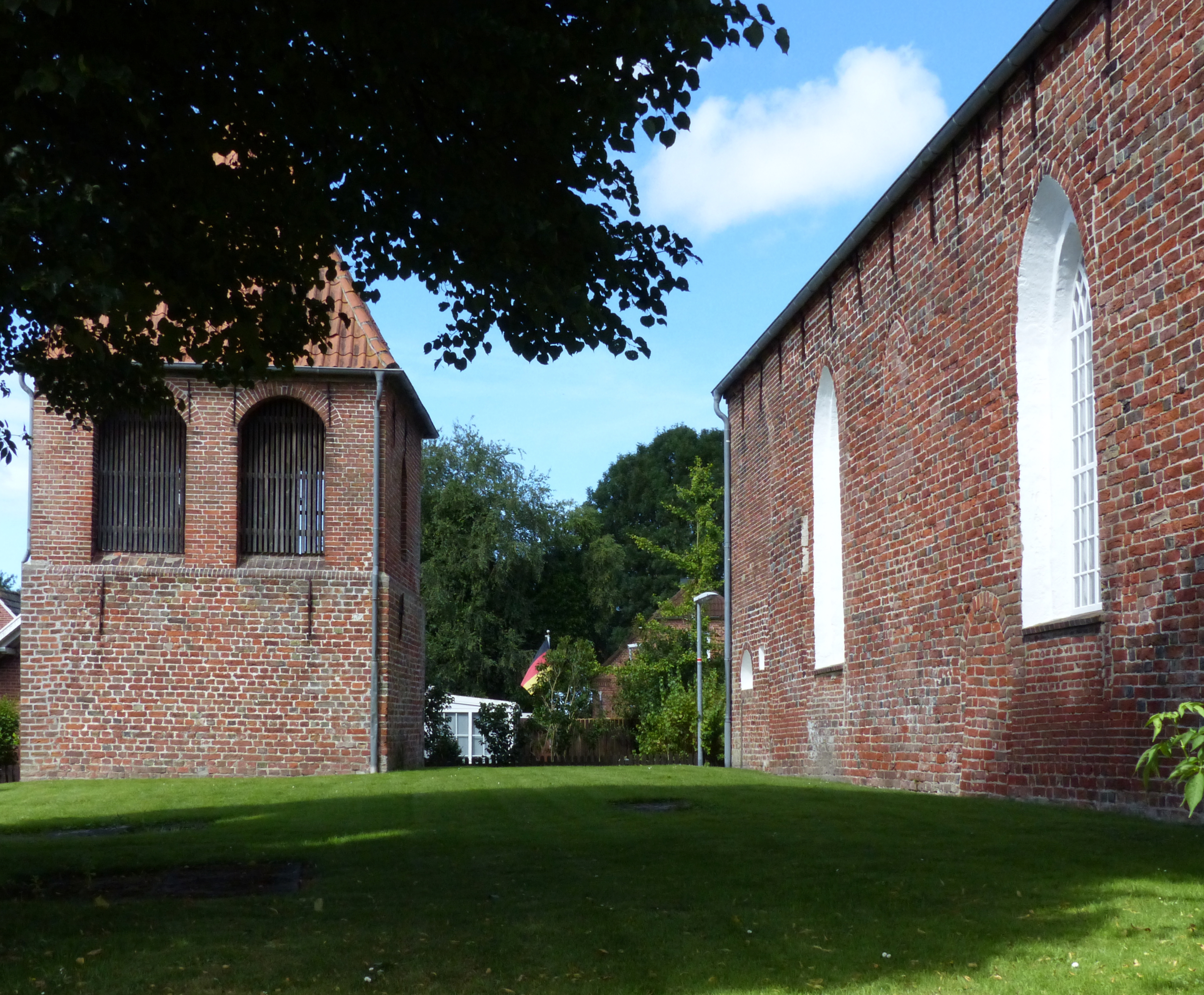 Südwand und Turm der Wirdumer Kirche